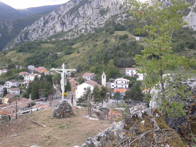 Panoramica di Meta